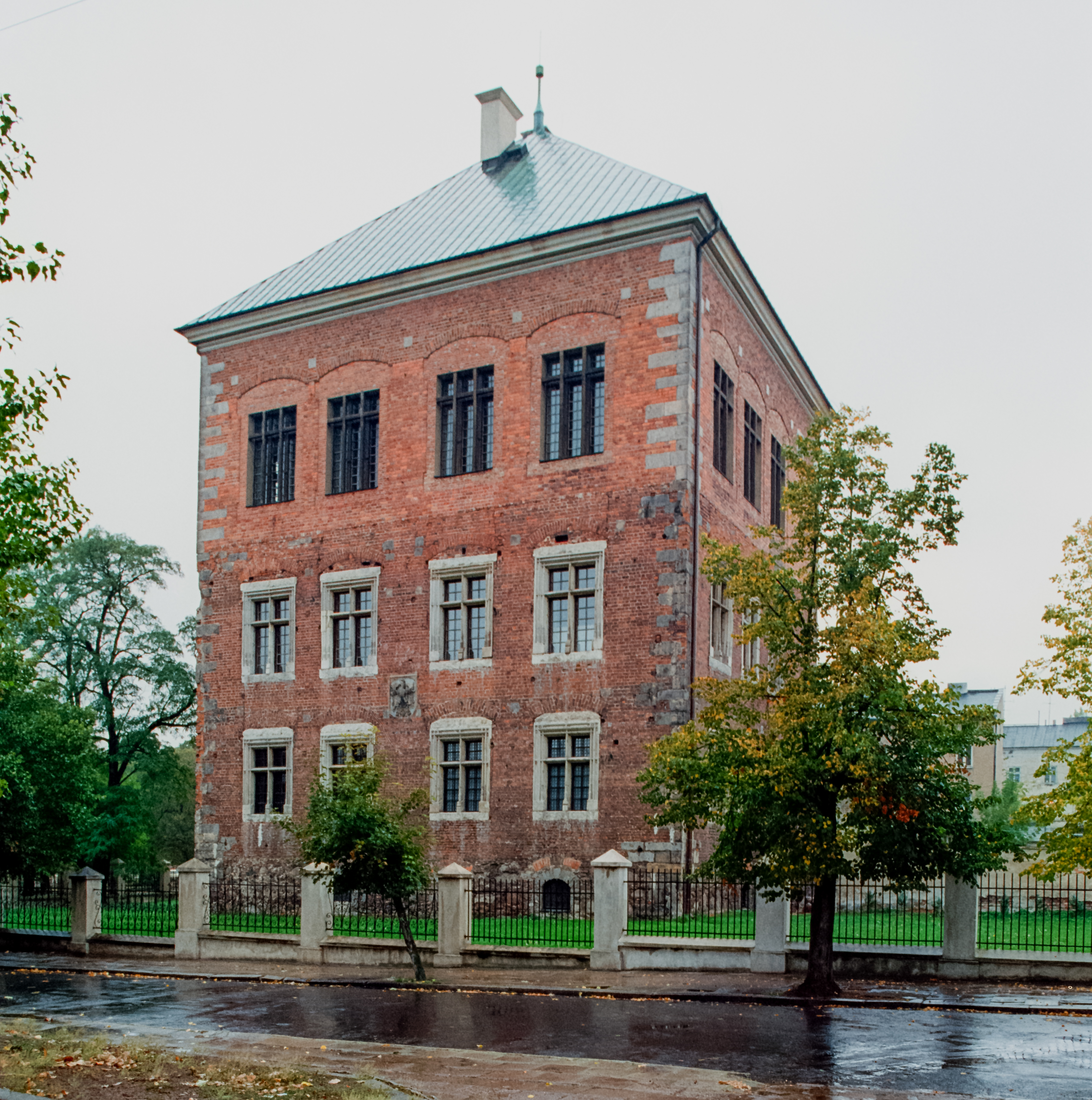 Piotrków Trybunalski, Poland